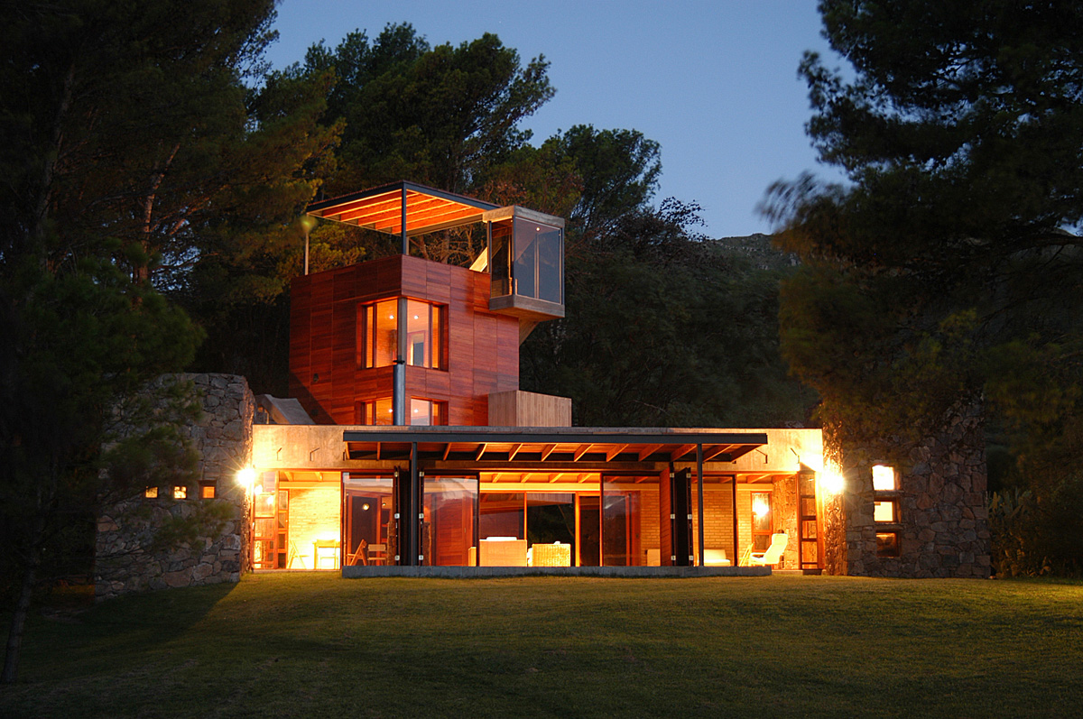 Casa en Calamuchita, Córdoba, Argentina.